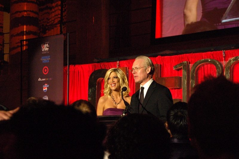 Tori Spelling and Tim Gunn. taken November 2007